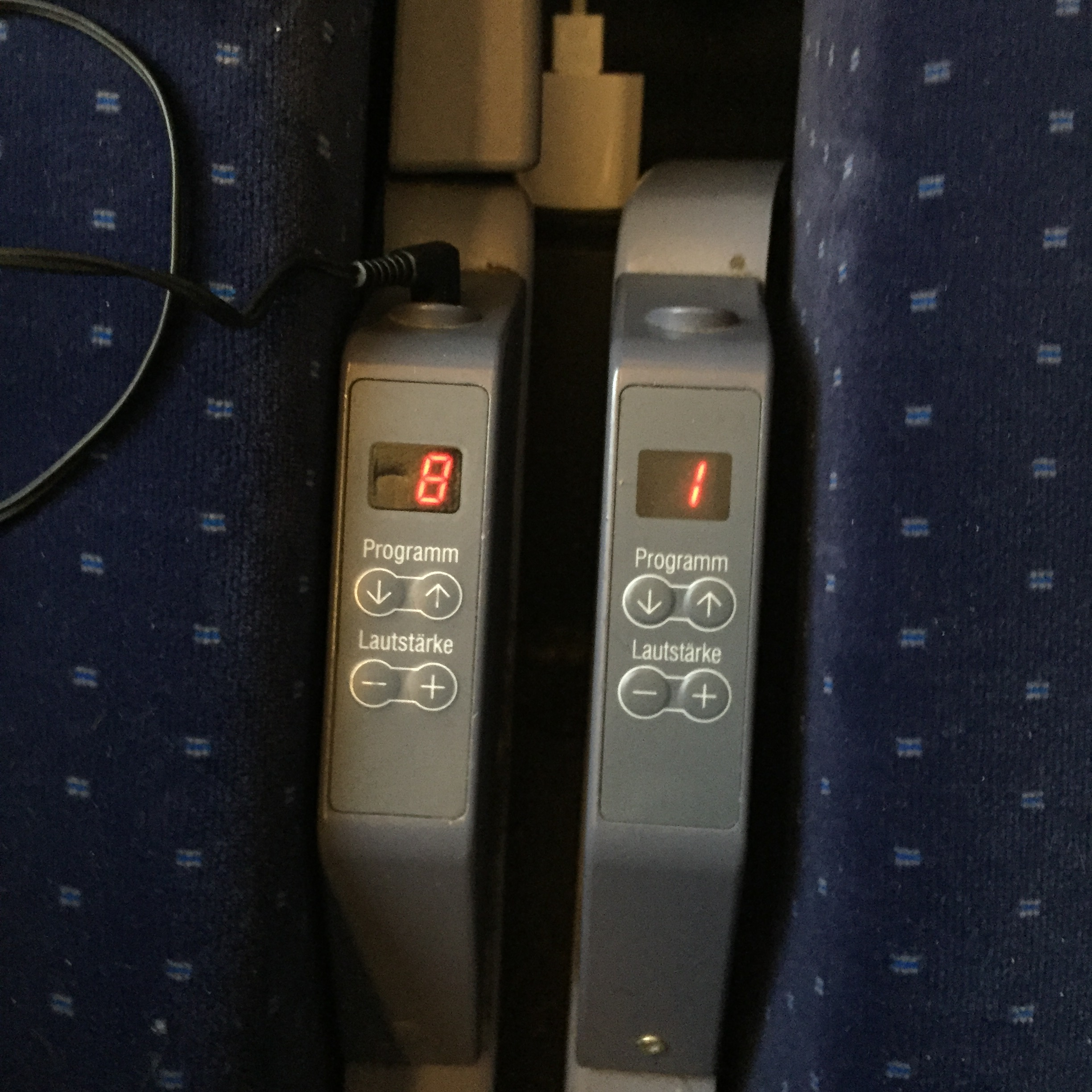 ICE - Bedienelemente Audio zwischen den Sitzplätzen Großraum